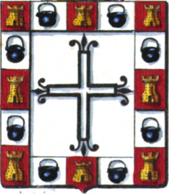 d'argent à la croix florencée de sable, vidée du champ, à la bordure componée de seize pièces, huit de gueules, chargées chacune d'une tour d'or et huit d'argent, chargées chacune d'une chaudière de sable.